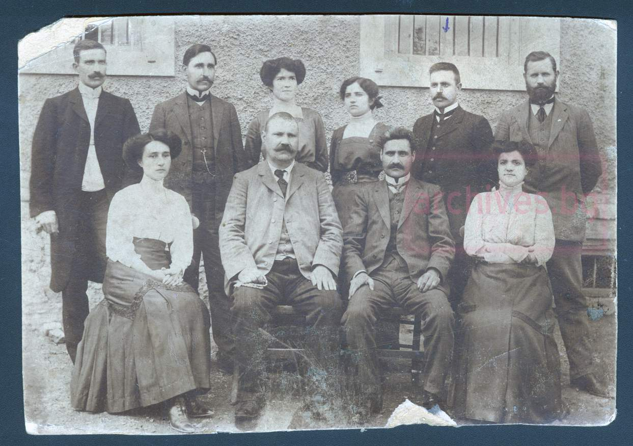 Учители в българското училище в Гумендже. Прави - Борис Янишлиев, Христо Батев, София Караянова, Венера Понсаева, Кирил Попиванов, Аргир Манасиев; Седнали - Виктория Мизева, Христодул Левов, Христо Стоянов, Олимпия Батанджиева.